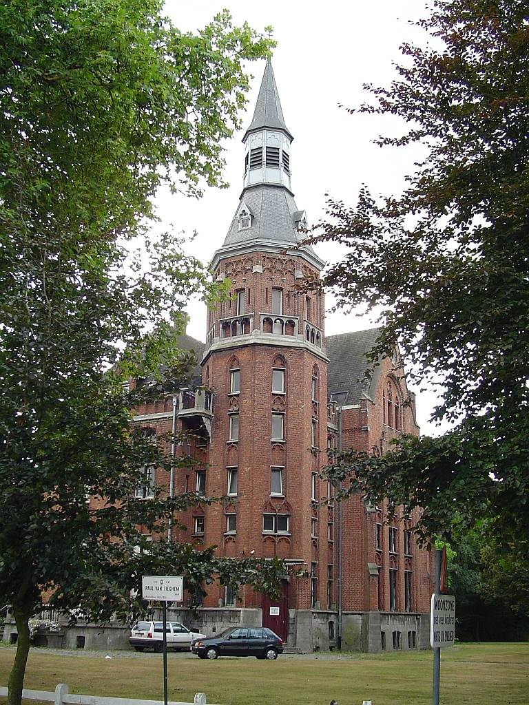 View of the Castle Paul Van Tieghem, former town hall of Mariakerke (Gent)